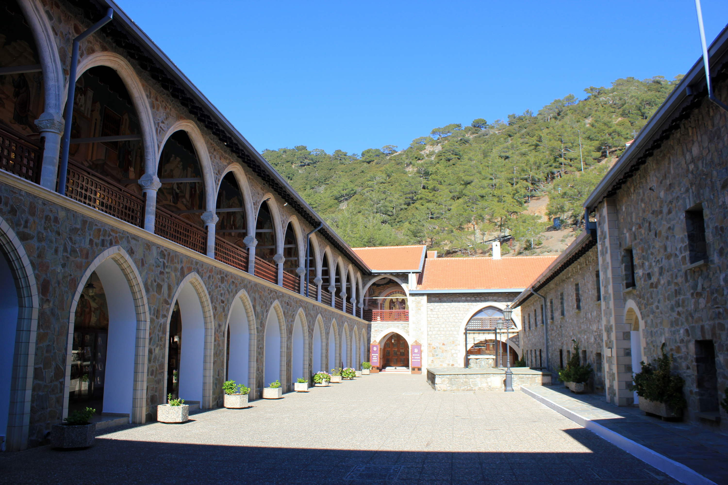 Der Innenhof des Klosters Kykkos, Zypern.